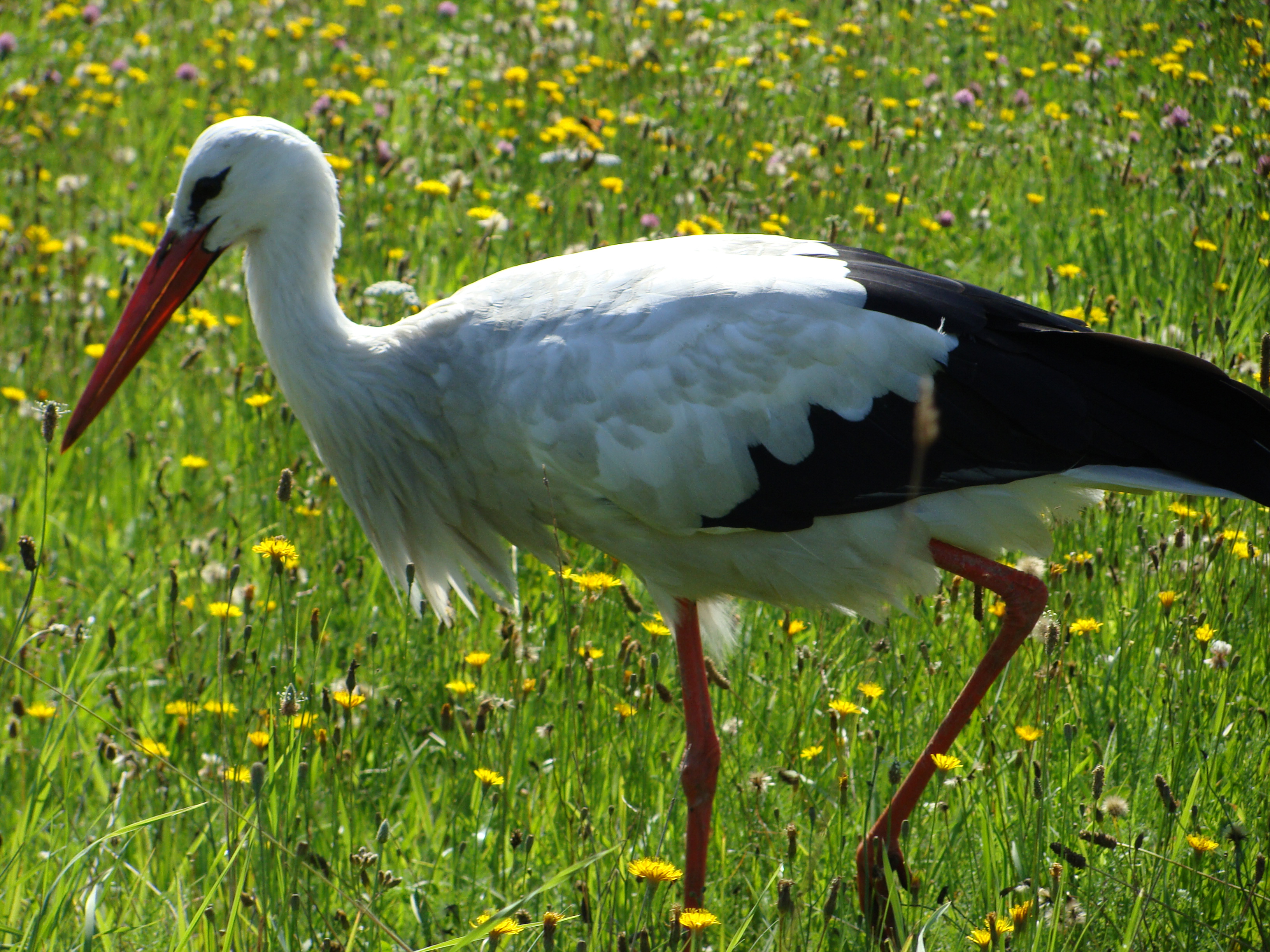 Bocian, Kadzidłowo 2011